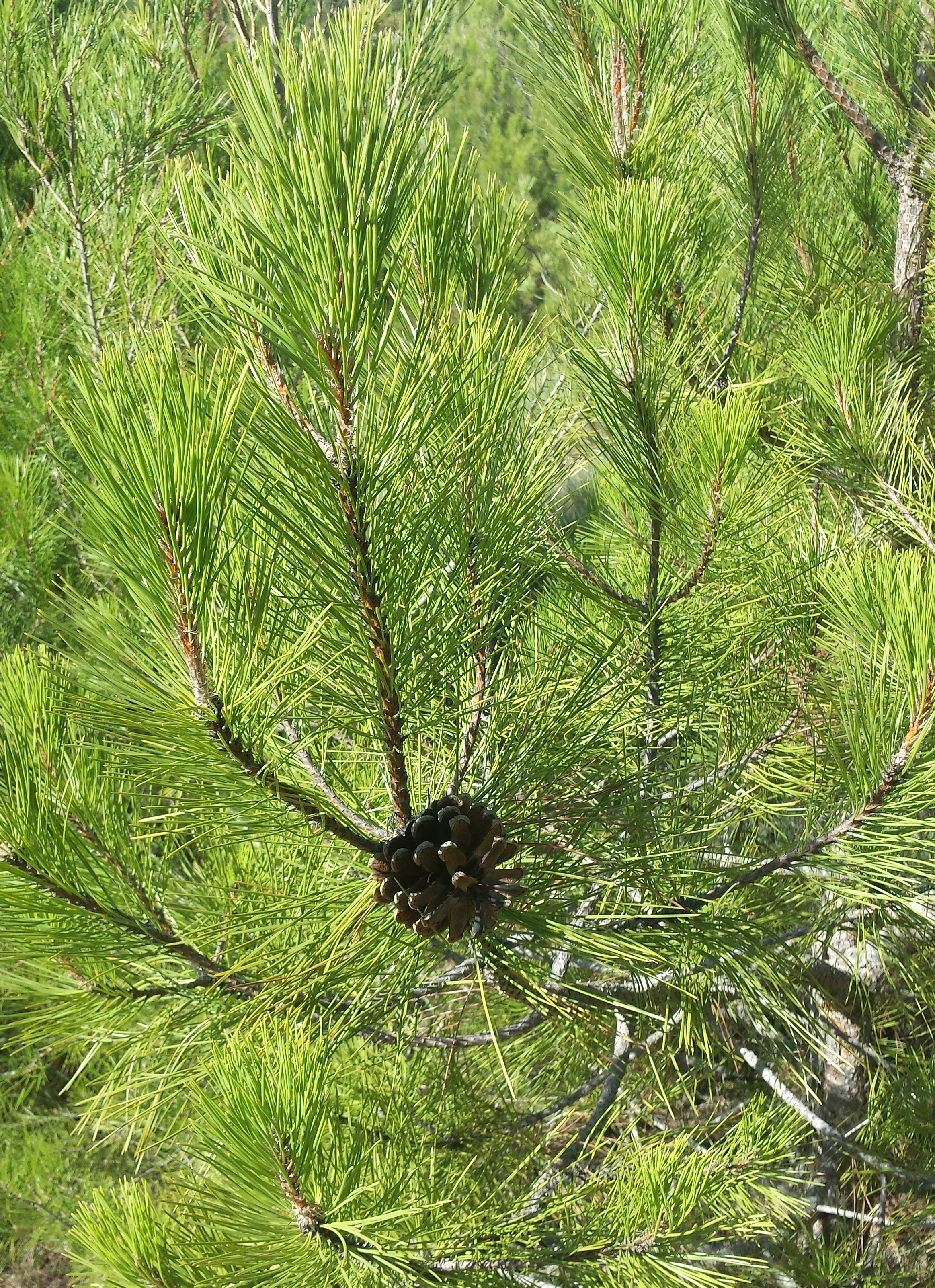 Pinya oberta de pinassa (Pinus nigra)